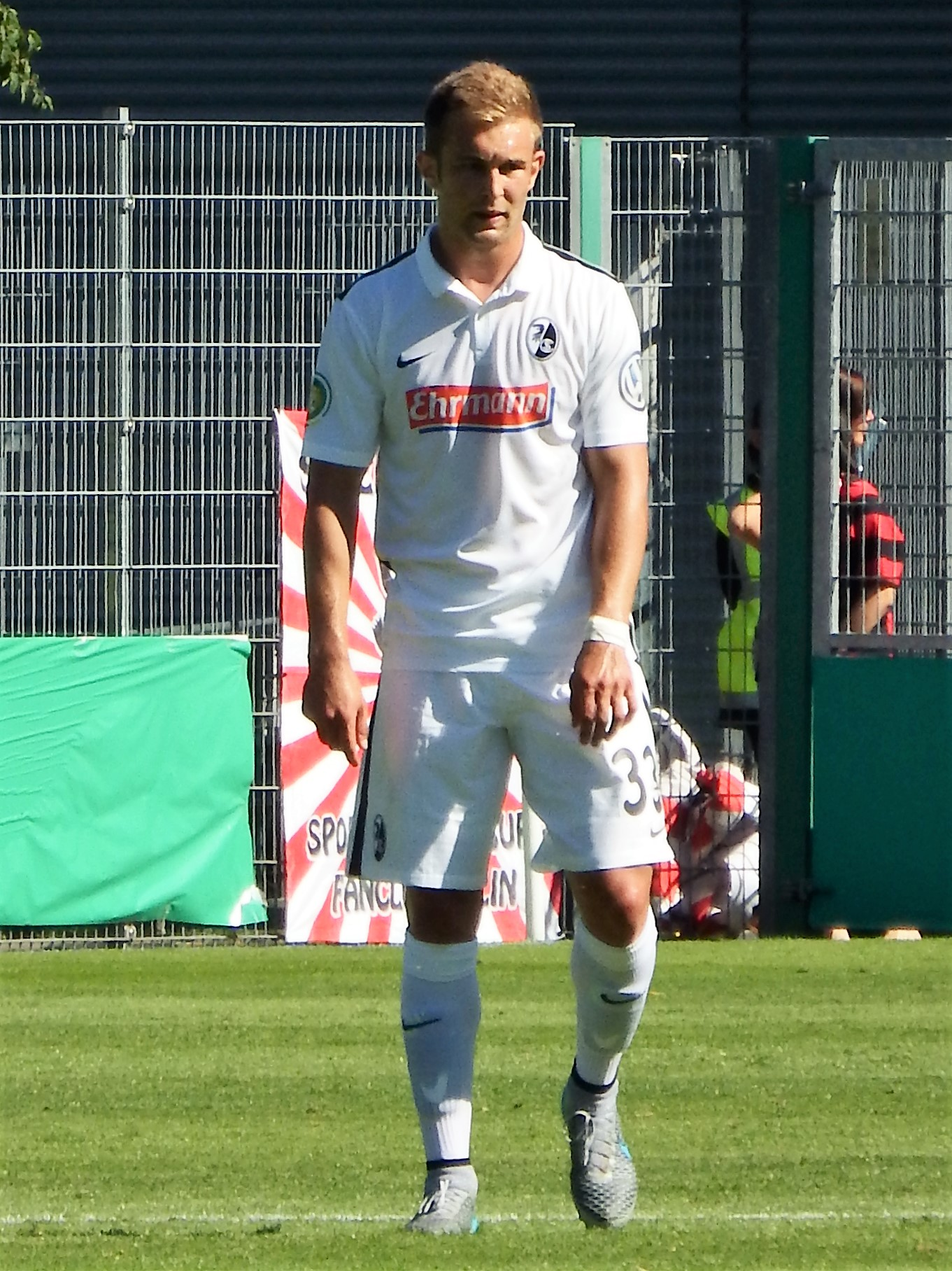 Stanko, Caleb SC Freiburg